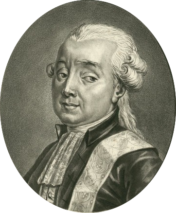 Comte Falcoz de la Blache